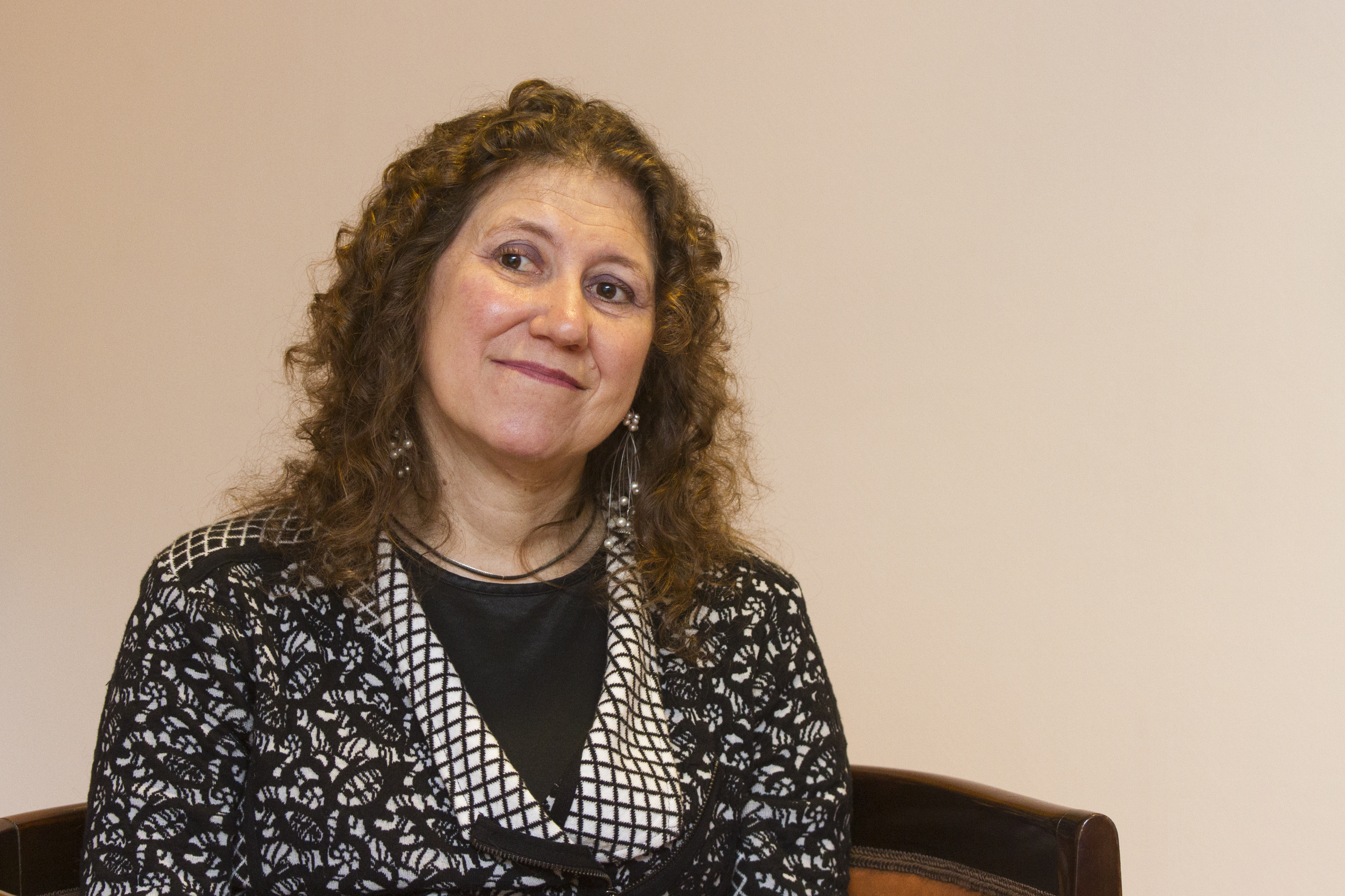 Rosario, 23 de julio de 2018.- “Astronomía con ondas Gravitacionales” charla a cargo de la científica argentina Gabriela González con la presencia del Ministro de Cultura de la Nación, Pablo Avelluto, el Presidente de la Academia Nacional de Ciencias Exactas, Físicas y Naturales y Co-Chair de S20, Roberto Williamsen; en Plataforma Lavardén Foto: Soledad Amarilla / Ministerio de Cultura de la Nación